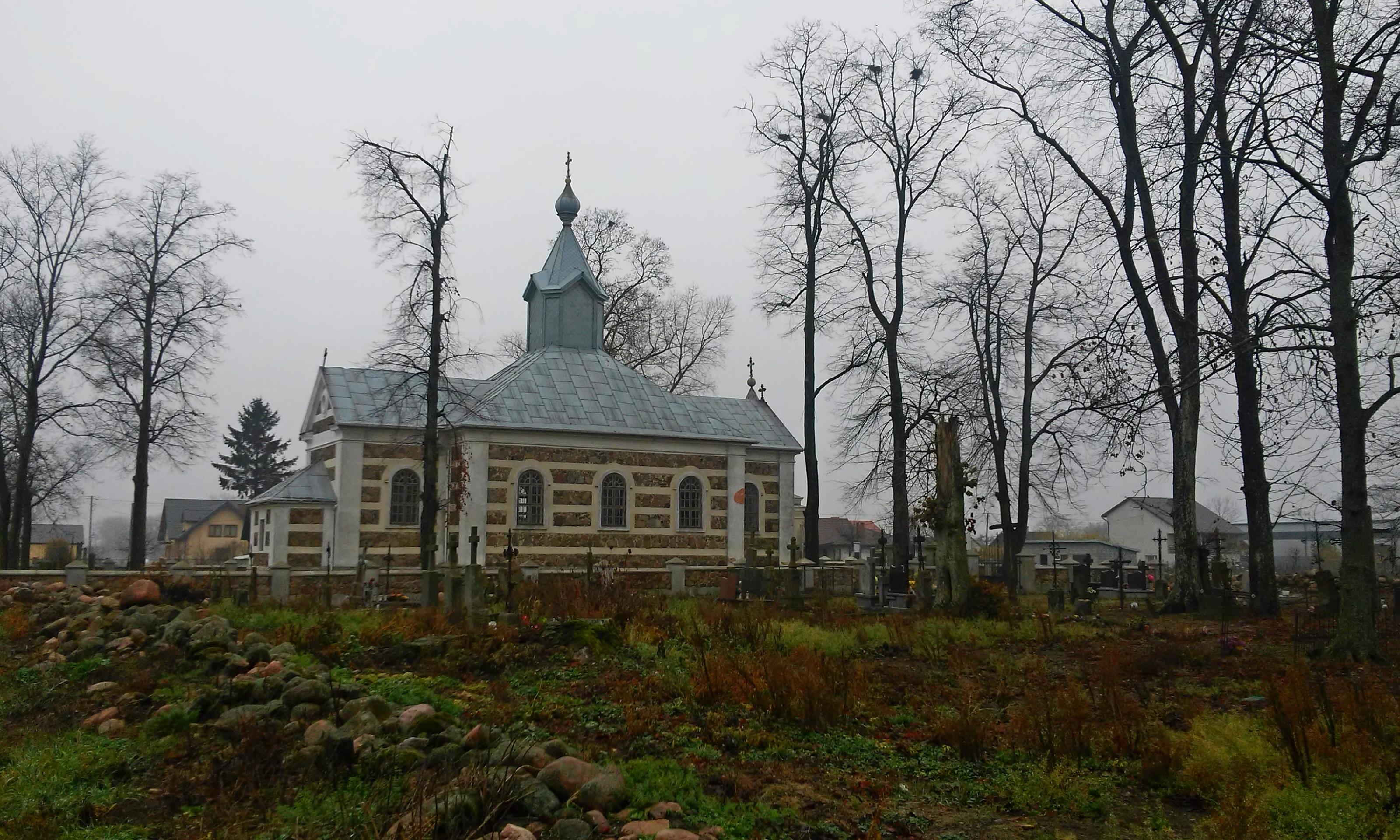 Cerkiew w Nosowie widziana od strony cmentarza